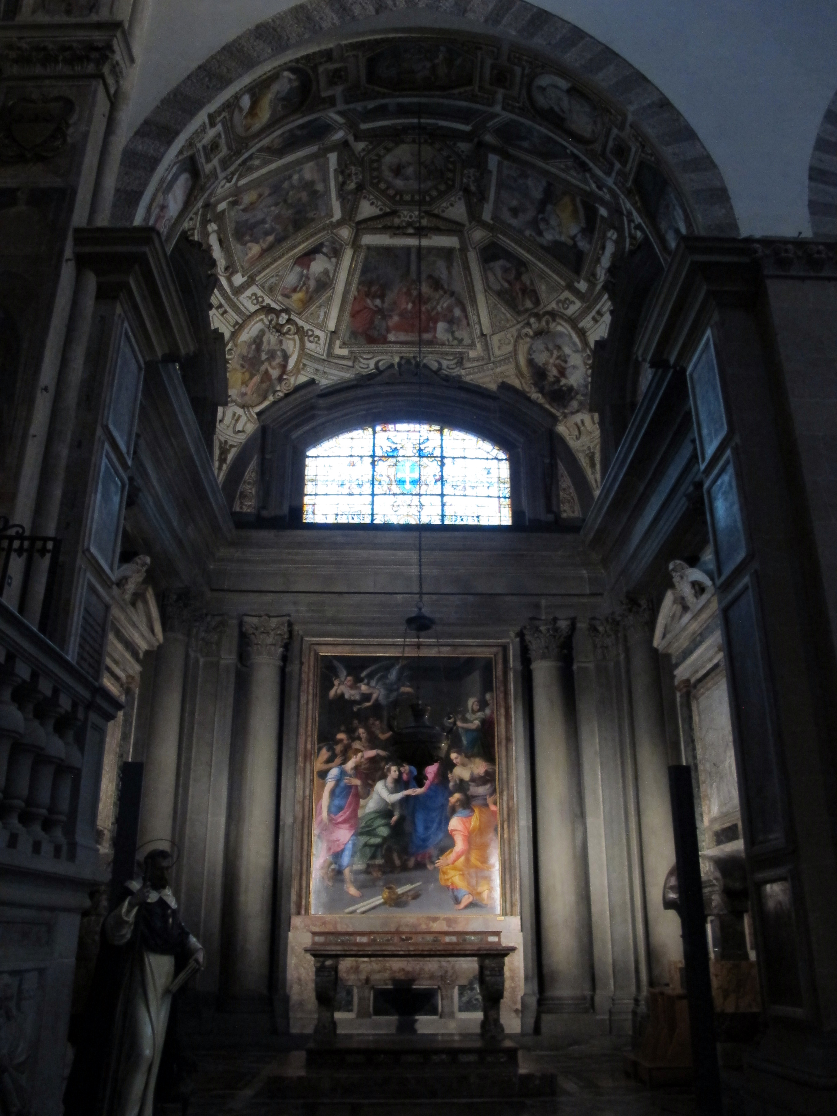 Cappella gaddi di smn 01 di giovanni antonio dosio, 1575-77